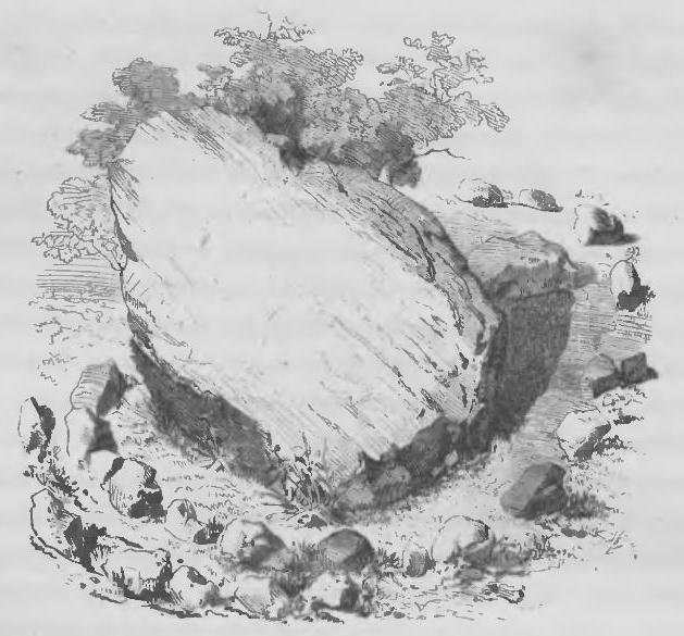 Беларуская (тарашкевіца): Тупальшчынскі вялікі камень на малюнках К.Тышкевіча з кнігі «Wilja i jej brzegi» 1871 г.